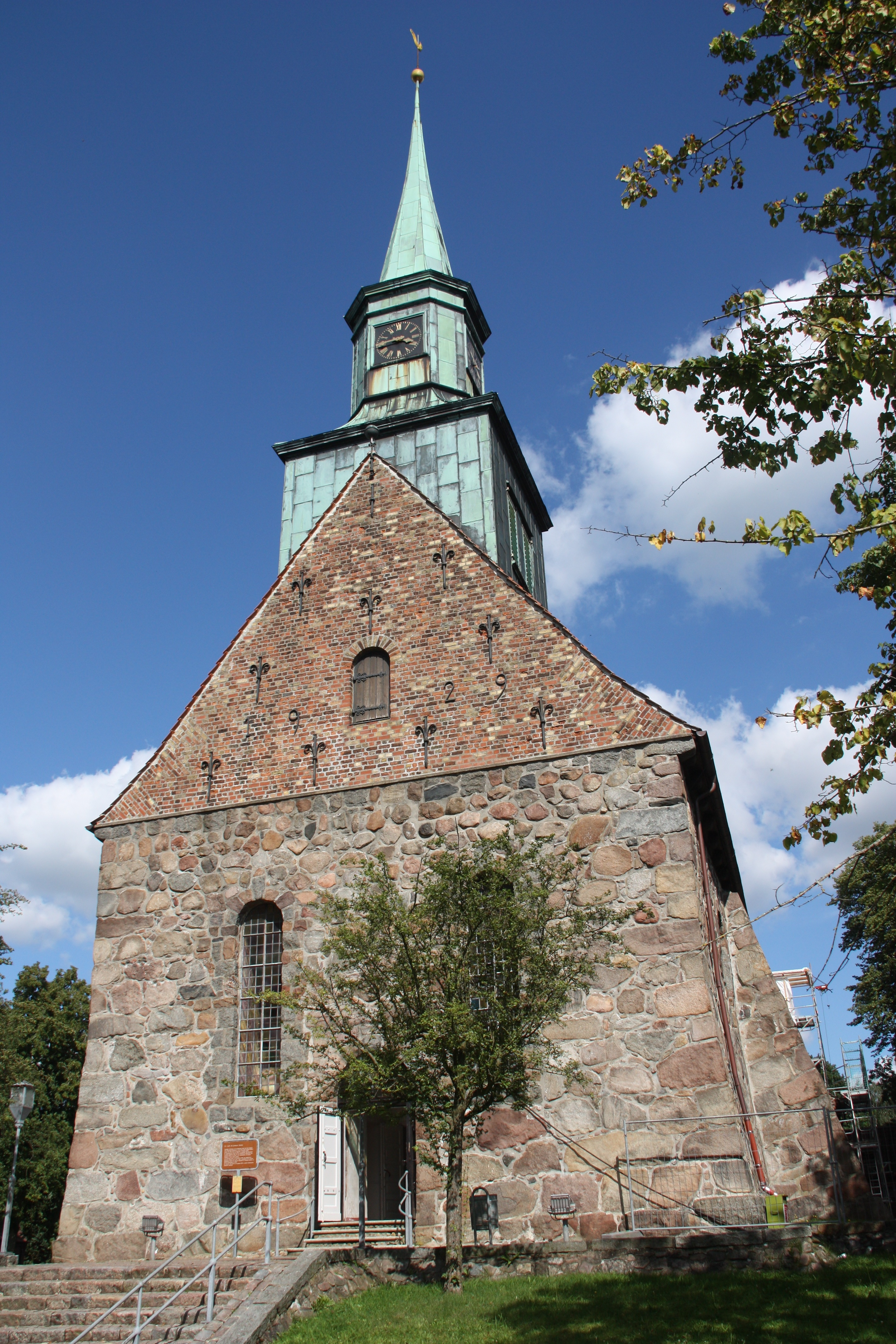 Kellinghusen, Kirche St. Cyriacus, Ansicht von der Turmseite